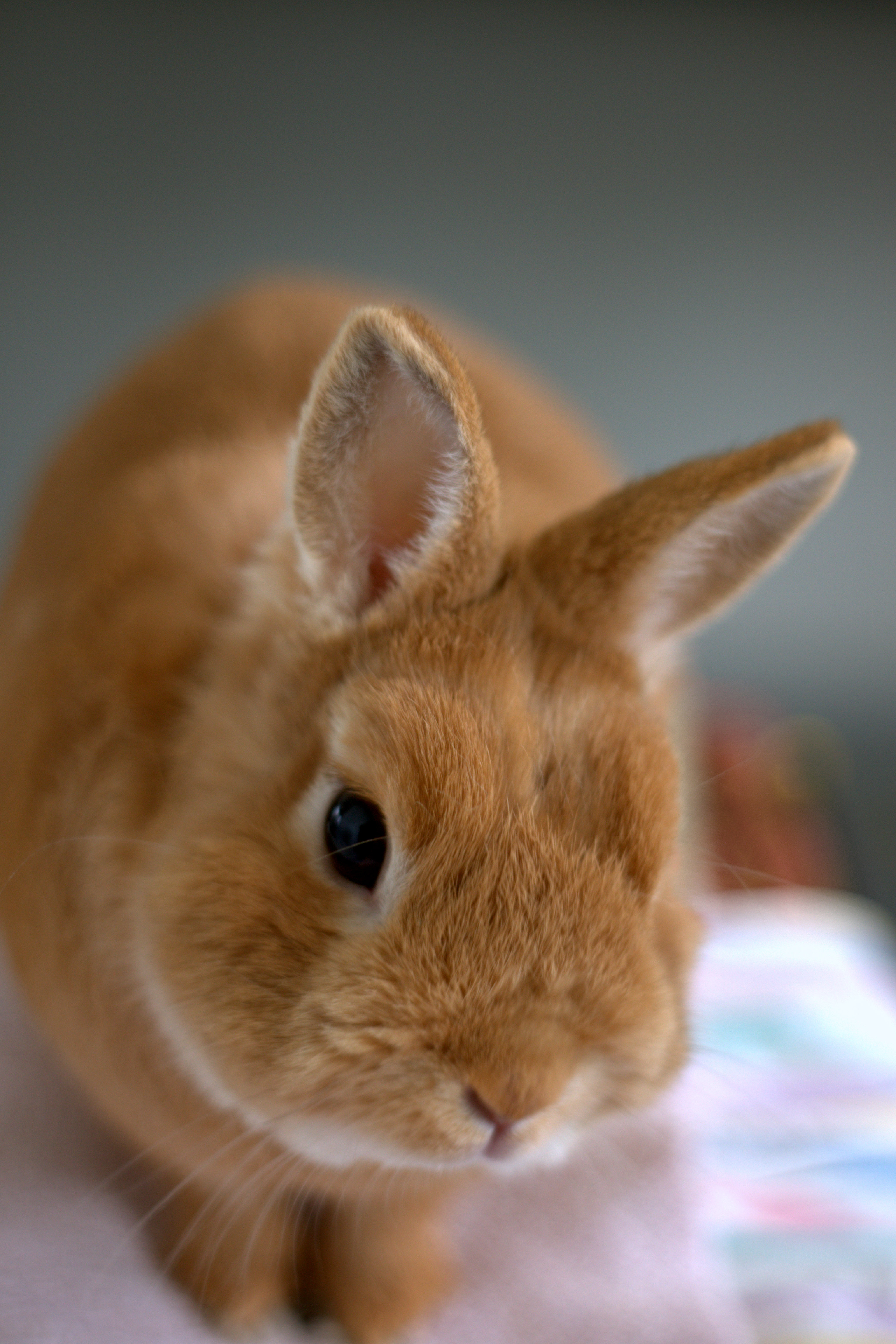 Höpö